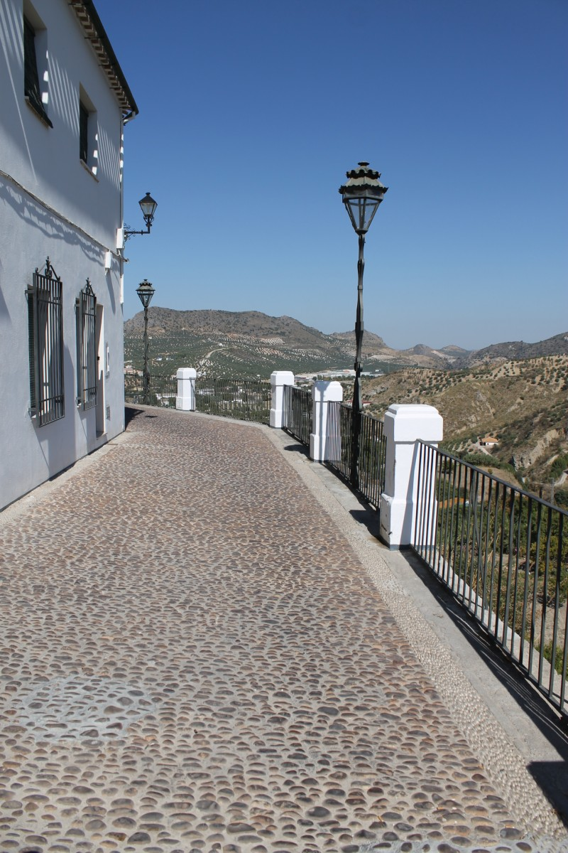 Mirador, Priego de Córdoba (España).